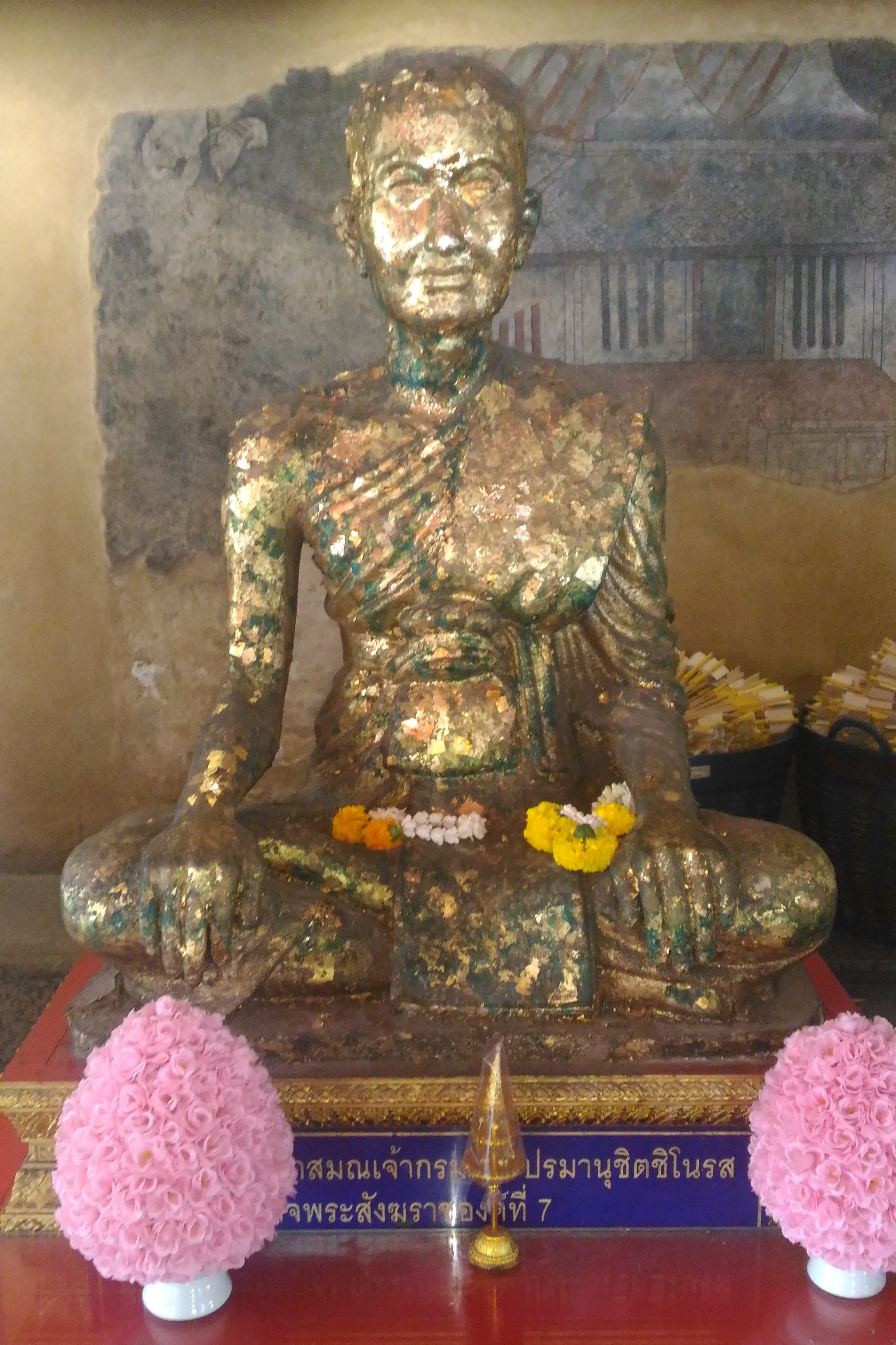 ประติมากรรมรูปสมเด็จพระสังฆราชเจ้า กรมพระปรมานุชิตชิโนรส สถิต ณ วัดพระเชตุพนวิมลมังคลาราม